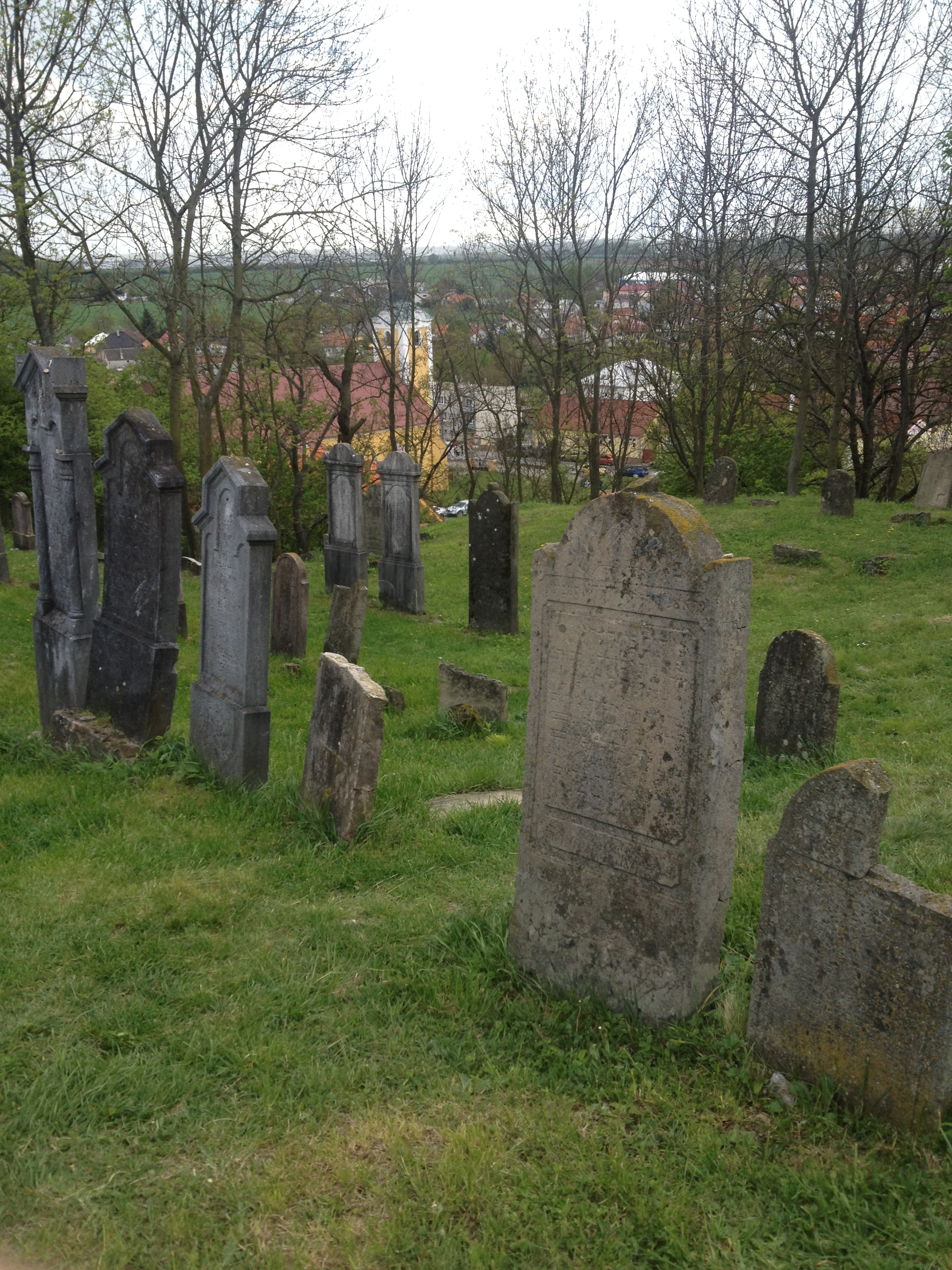 916 38 Beckov, Slovakia